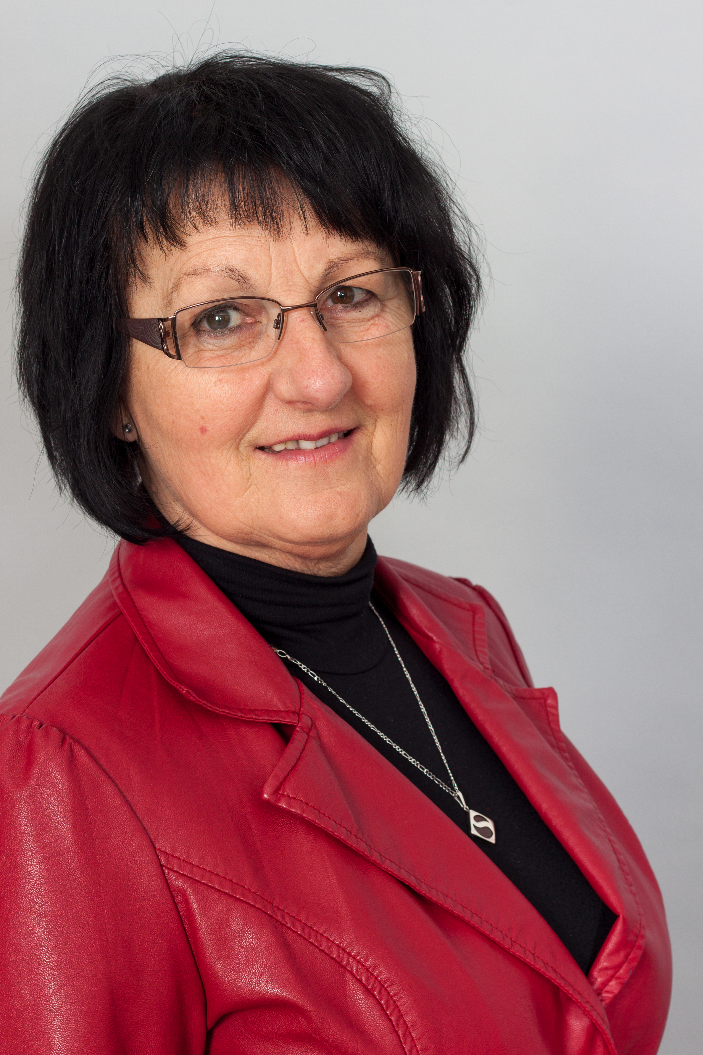 Abgeordnete des Sächsischen Landtages Marie-Luise Apostel